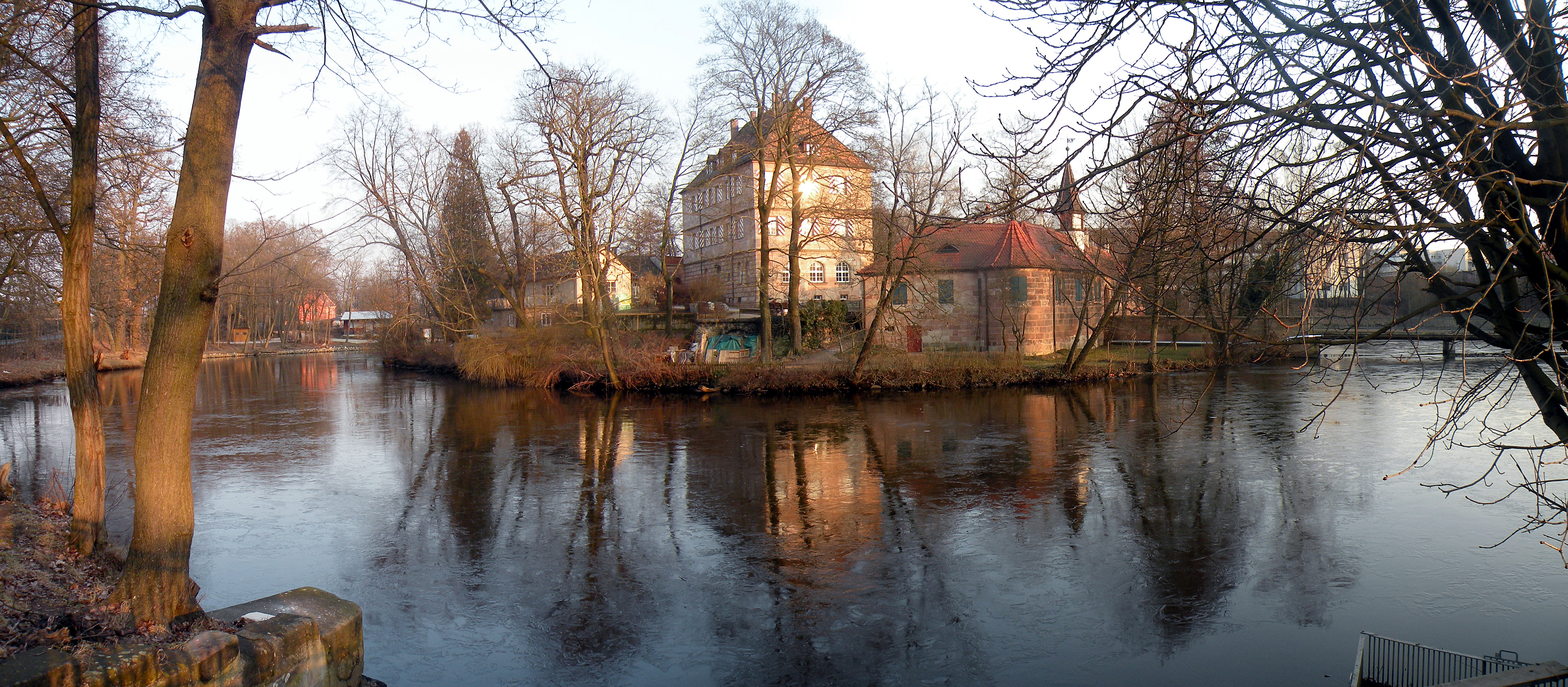 Нюрнберг. Р-н Гляйсхаммер. Замок Zeltnerschloss на воде